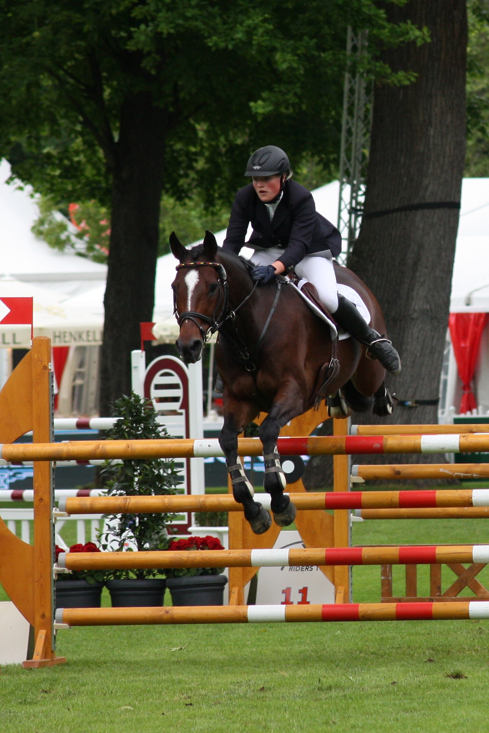 77. Internationanles Wiesbadener Pfingstunier 2013, CIC *** Vielseitigkeitsprüfung Springen, Freya Füllgraebe auf Oje Oje Personality rights warning Although this work is freely licensed or in the public domain, the person(s) shown may have rights that legally restrict certain re-uses unless those depicted consent to such uses. In these cases, a model release or other evidence of consent could protect you from infringement claims.